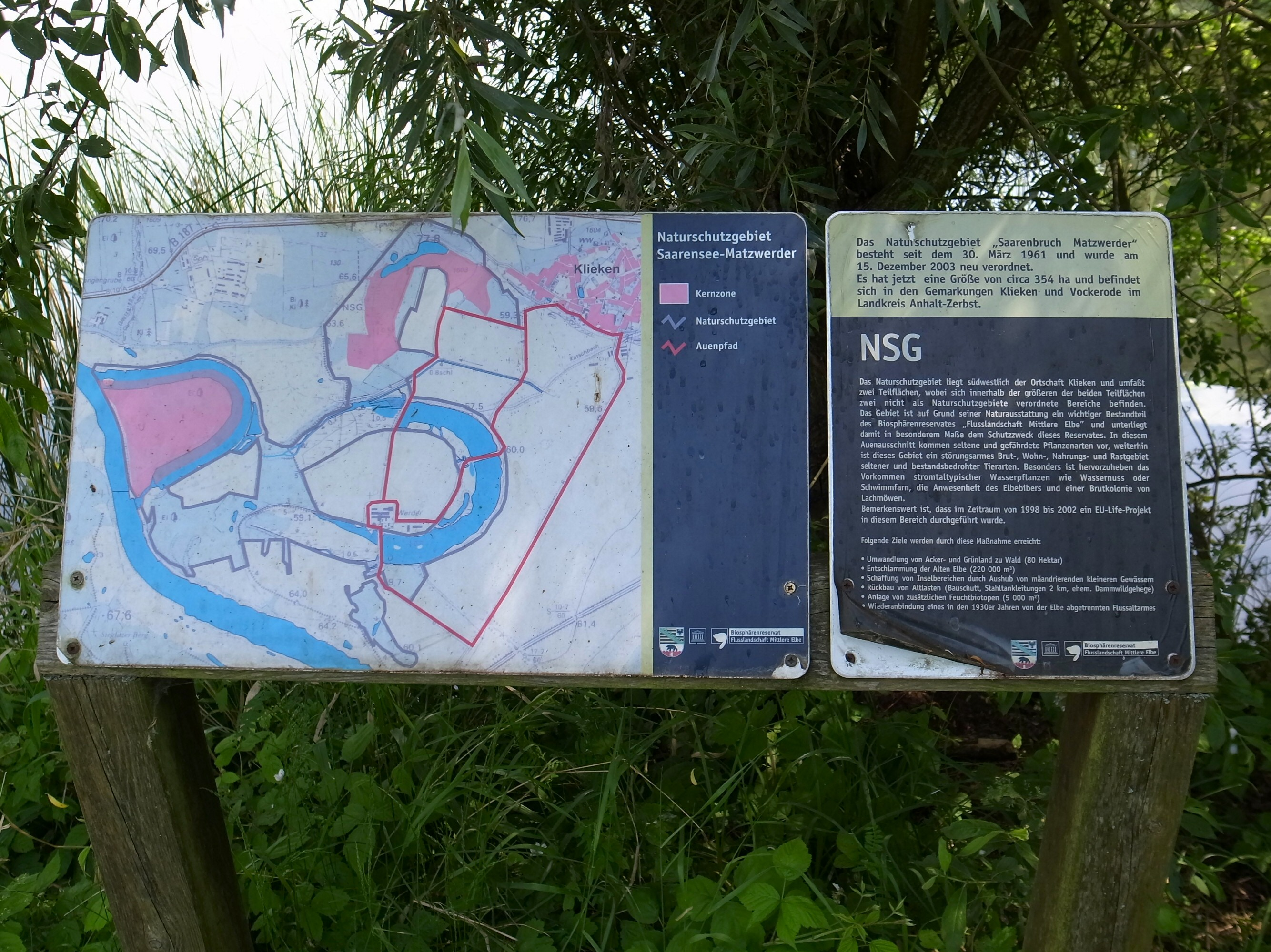 Coswig (Anhalt), Ortsteil Klieken, Informationstafel im Naturschutzgebiet Saarenbruch Matzwerder